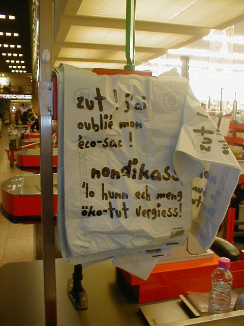 Walon: saetchot, a payî, avou on spot : "Nodidjo ! dj' a co rovyî m' saetch ralouwåve !" ((poirtrait , Strassen, Grande Dutcheye, e moes d' måss 2007)